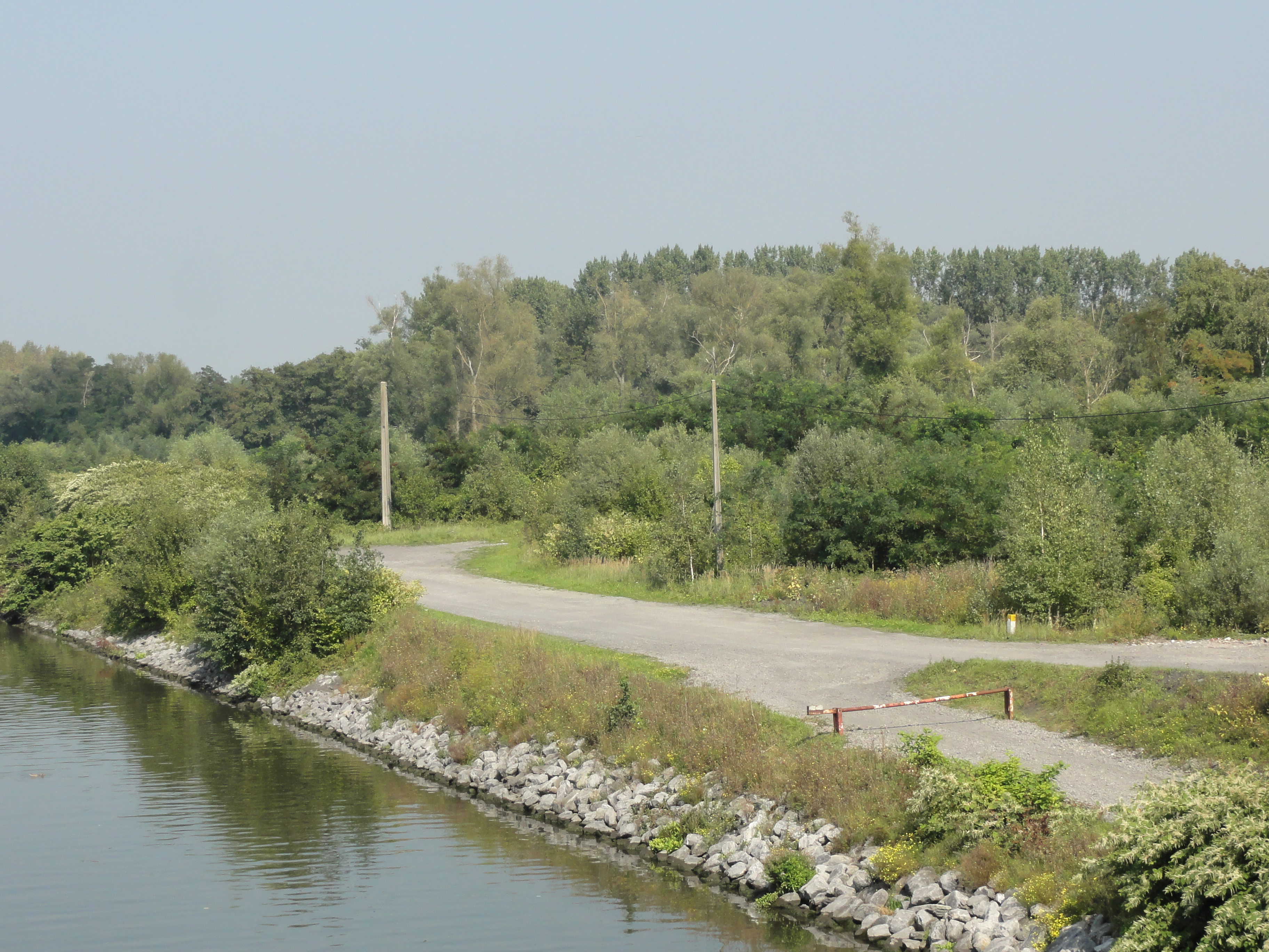 Terril n° 235 dit Cavalier de Soult, Fosses Soult de la Compagnie des mines de Thivencelle, Fresnes-sur-Escaut, Nord, Nord-Pas-de-Calais, France.